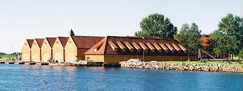 Fredriksvern, Stavern: galeiskura. (Fredriksvern naval dockyard, Stavern, Norway: The galley houses)